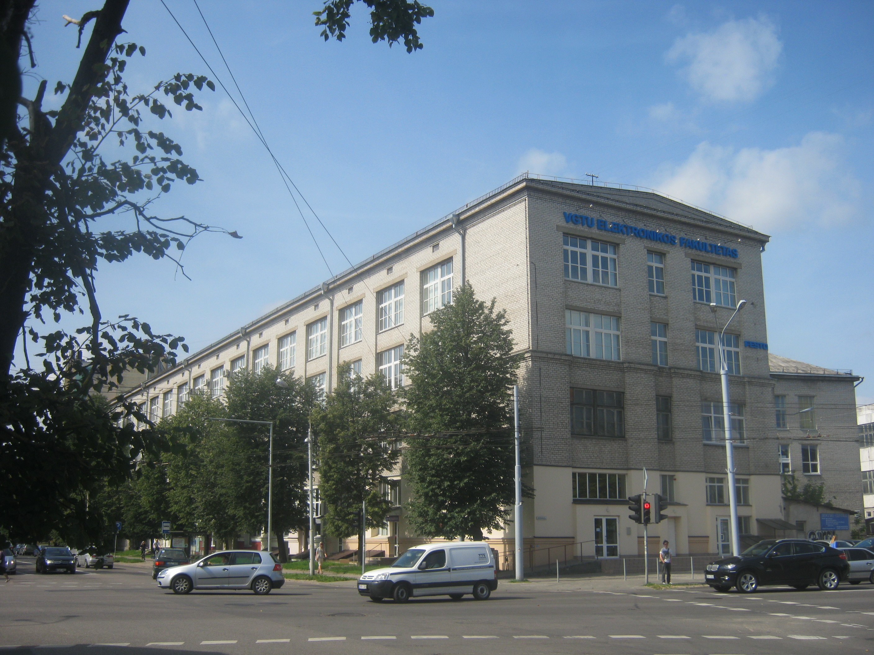 VGTU Elektronikos fakultetas